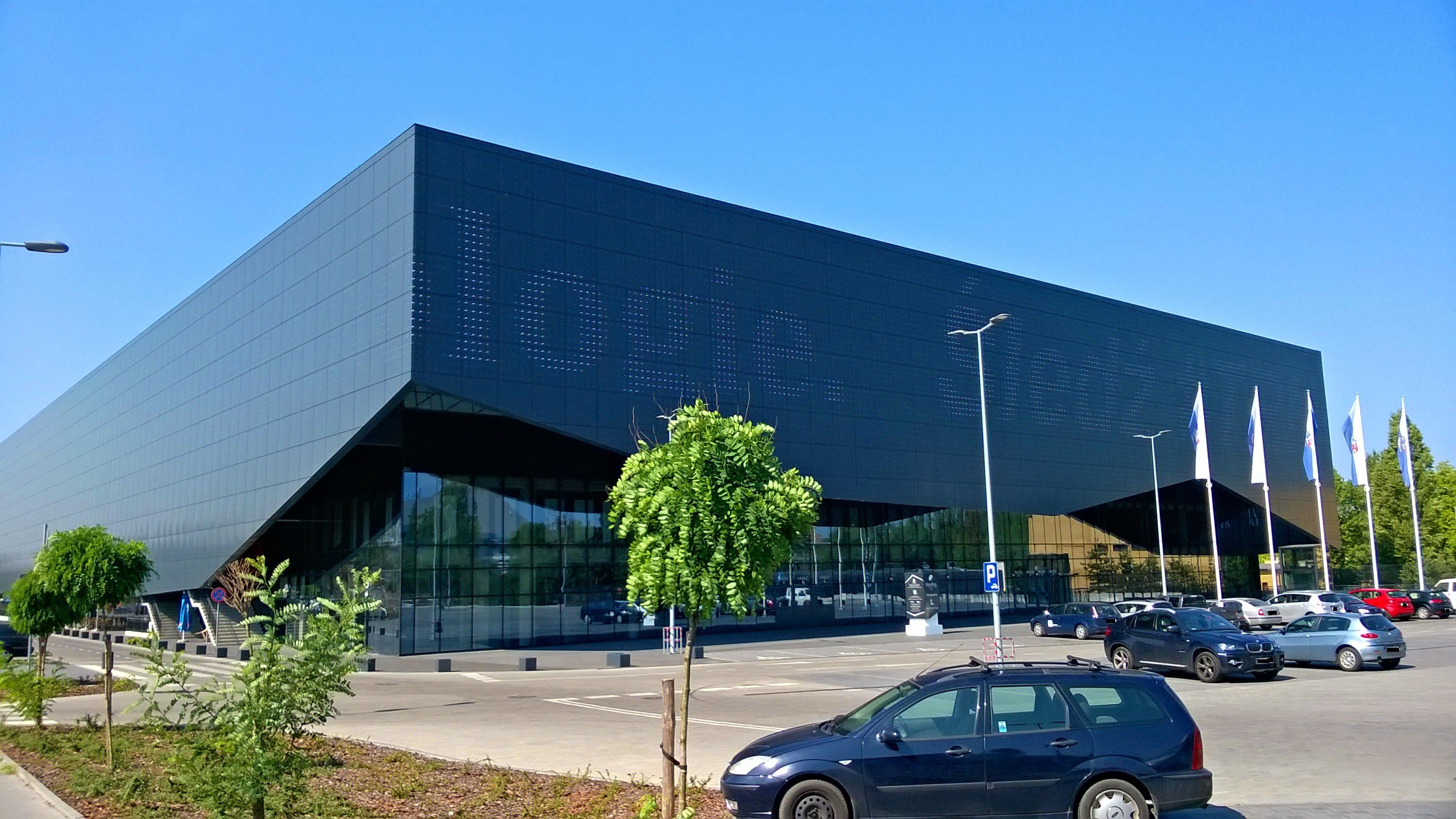 Hala sportowo-widowiskowa w Toruniu88